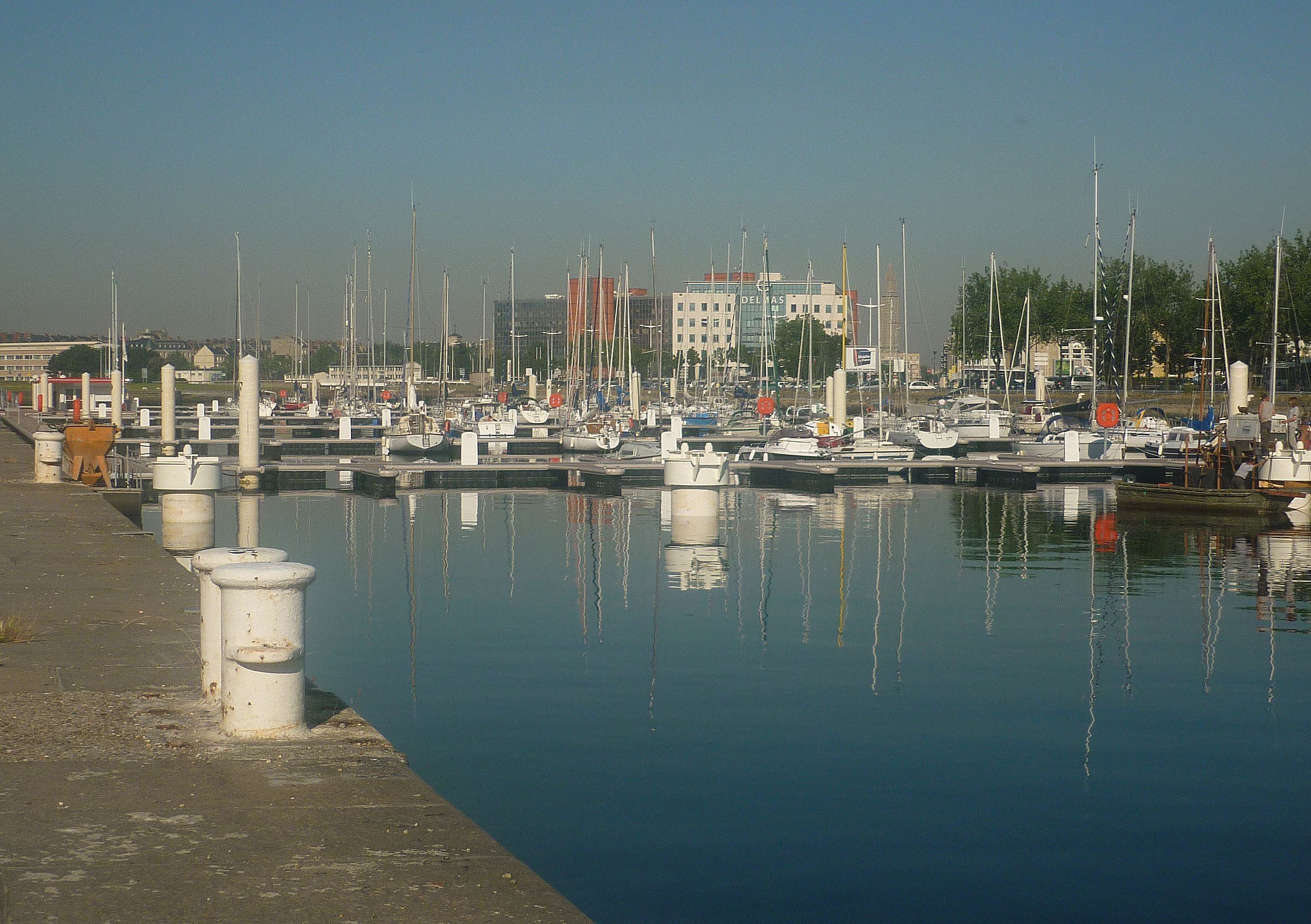 Port Vauban, Bassin Vauban, Le Havre